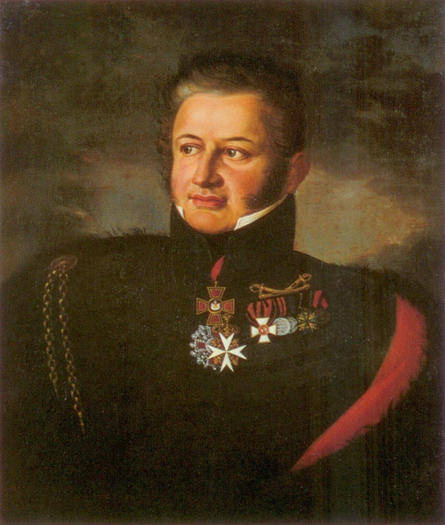 Давыдов Александр Львович (1773-1833), генерал-майор